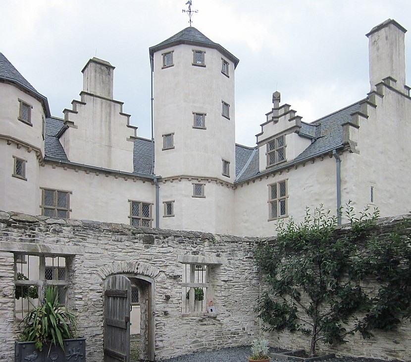 Plas Mawr Conwy UK